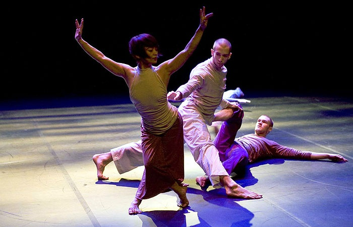 Představení Freska v Národním divadle v Praze, choreografie: Paco Decina, produkce: Centrum choreografického rozvoje SE.S.TA, rok uvedení: 2011